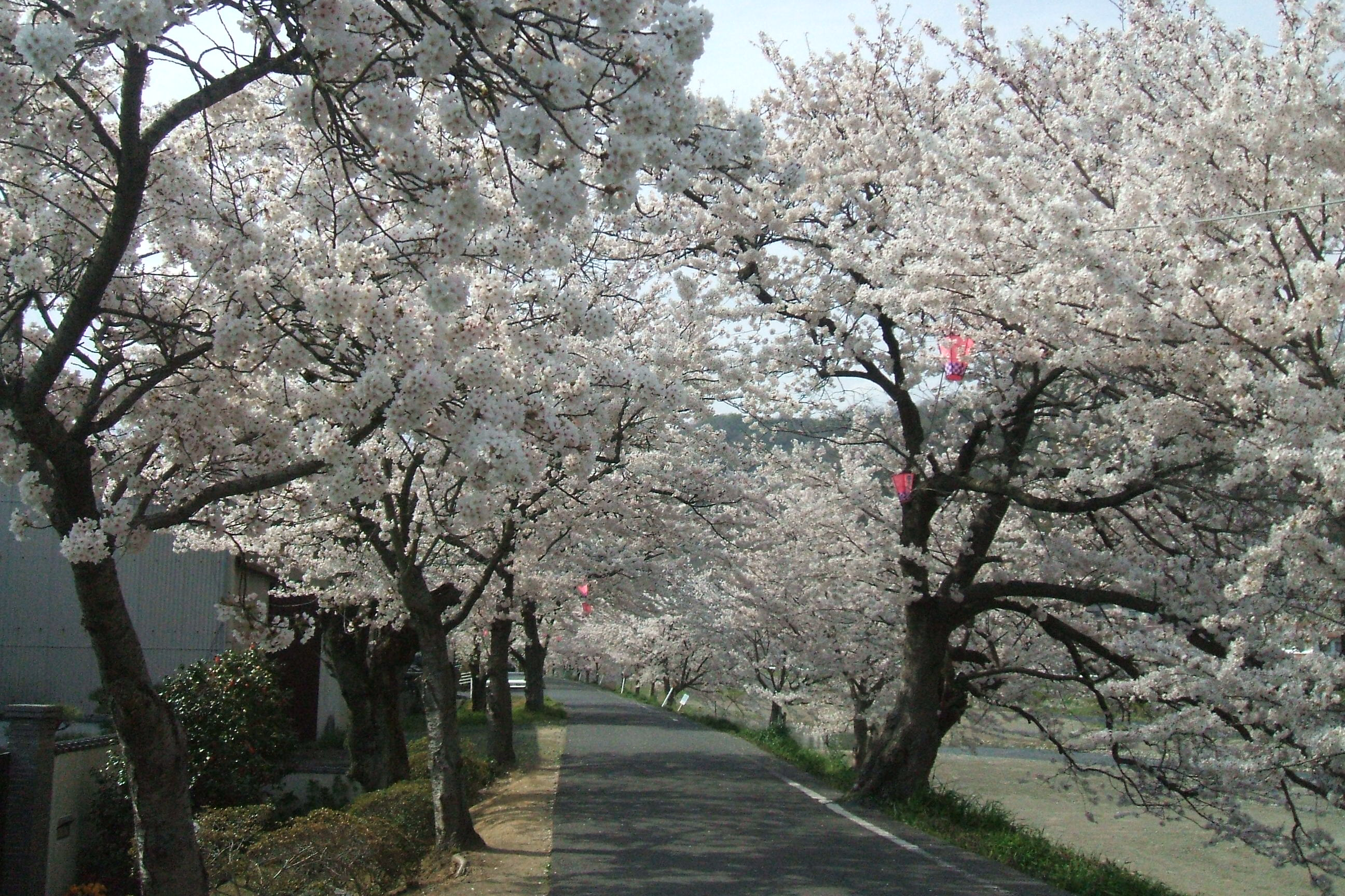 岡山県井原市の小田川沿いにある満開の桜並木